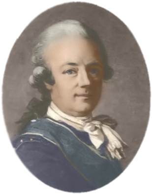 Wilhelm Mauritz Klingspor, Osmonsalo Suomen valloitus 1808